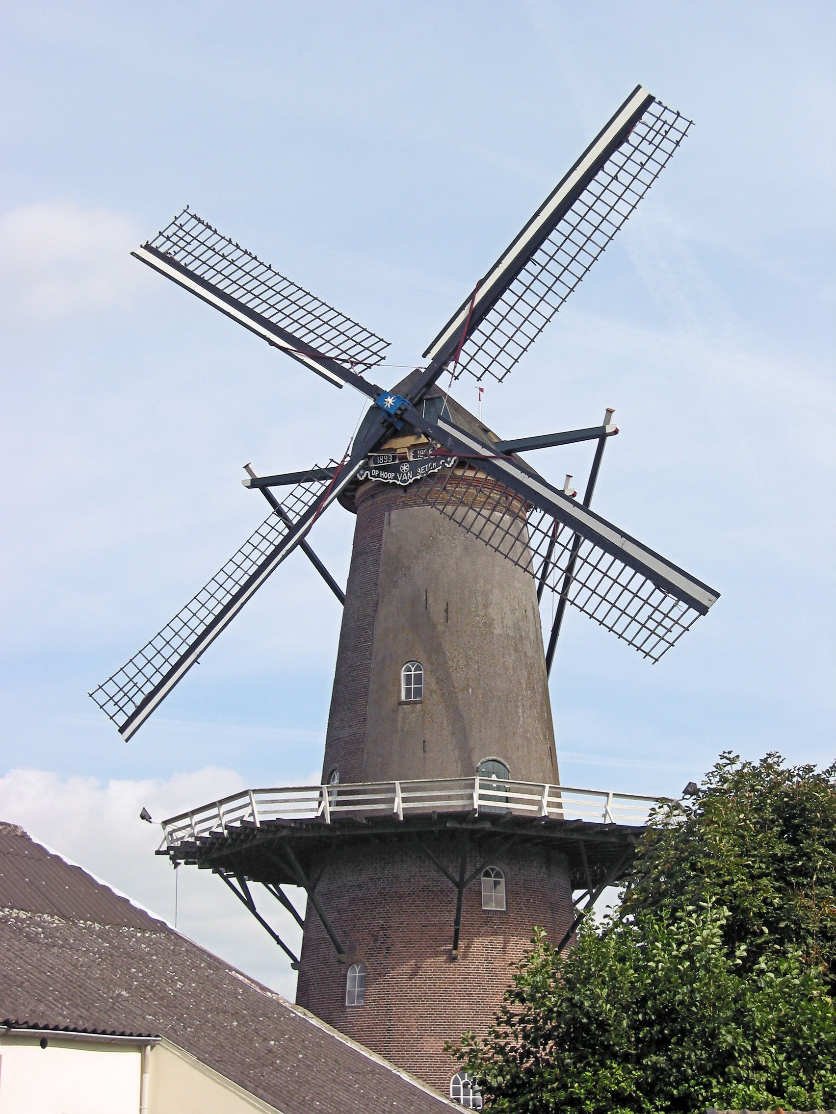 Molen Op Hoop Van Beter, Ingen, Gelderland, the Netherlands